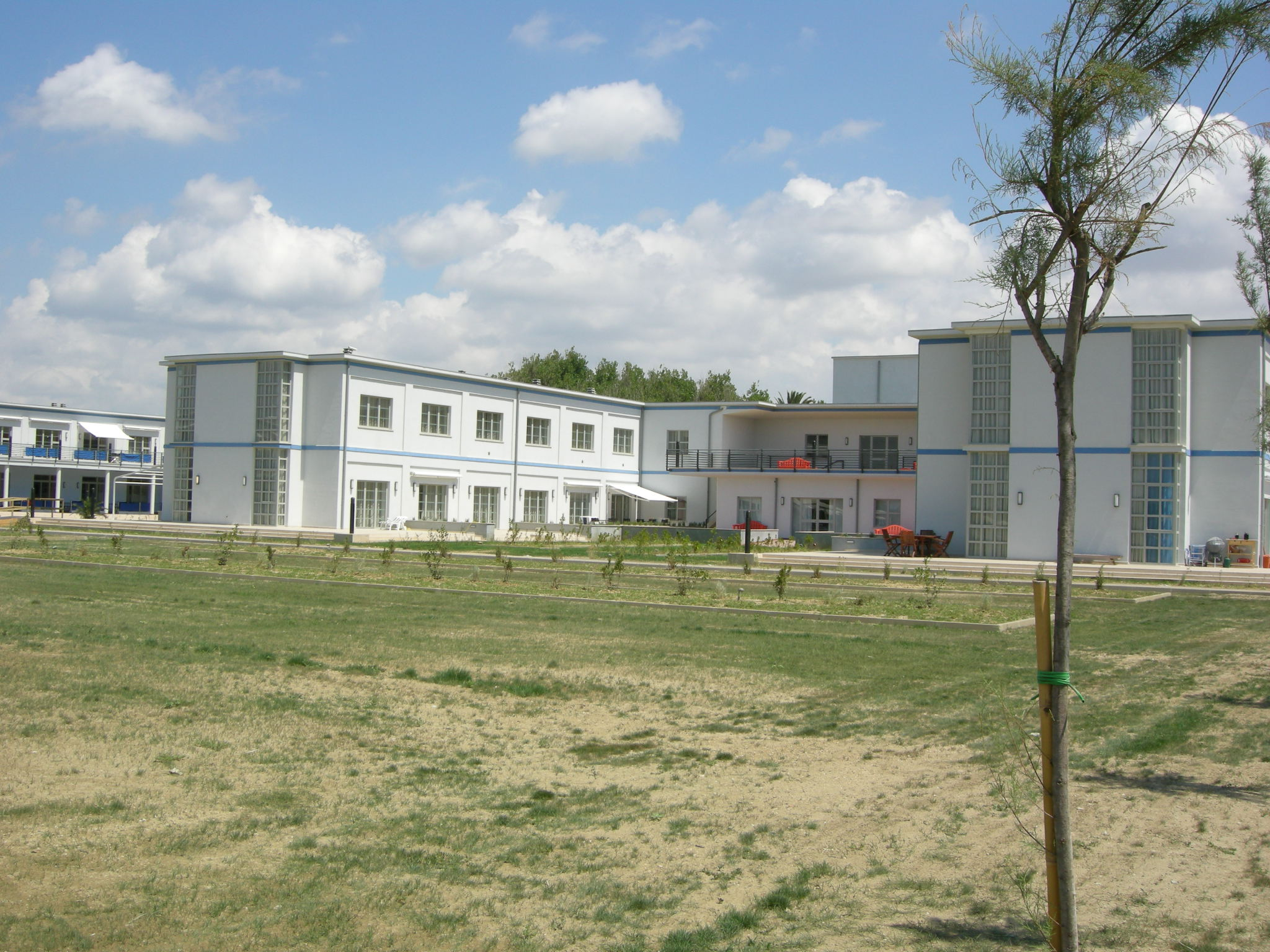 Ex colonia dei Fasci Italiani all'Estero